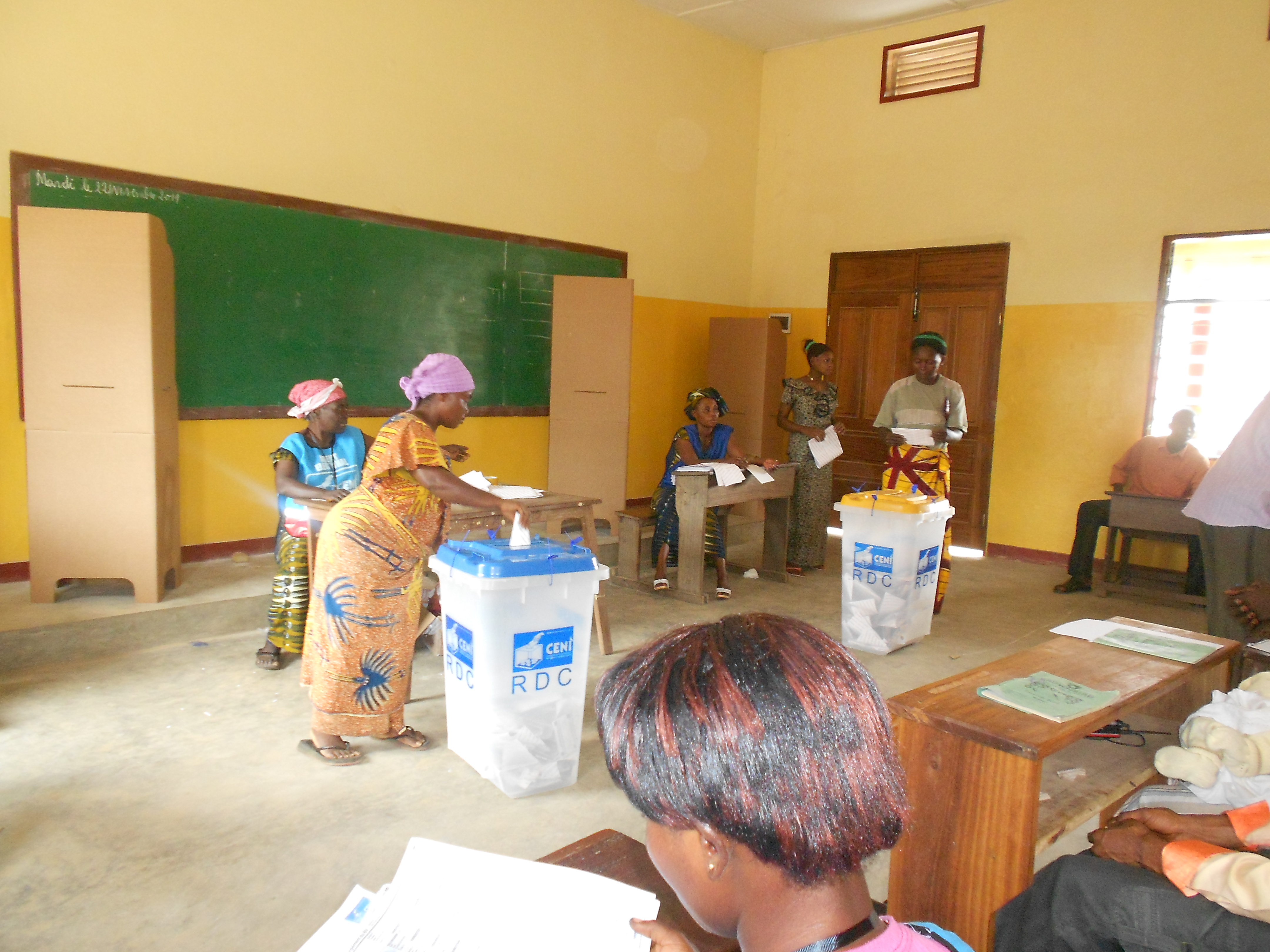 Kindu